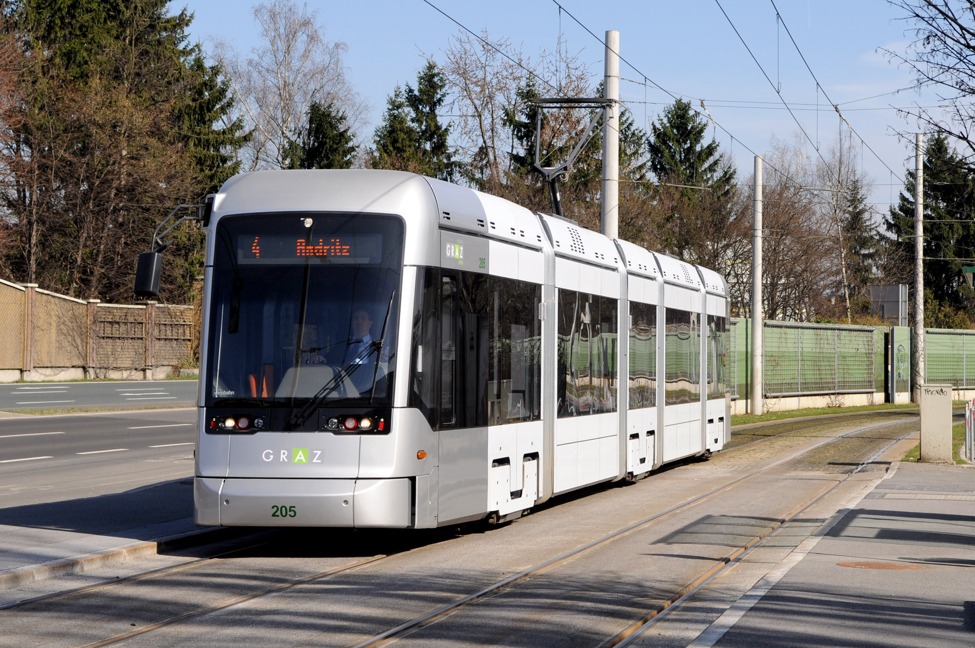 Variobahn Nr. 205 der Graz Linien auf der Linie 4, bei der Haltestelle Dr.-Lister-Gasse